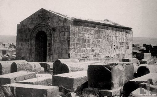 Հին Երևանի Կոզեռնի մատուռն ու գերեզմանատեղին